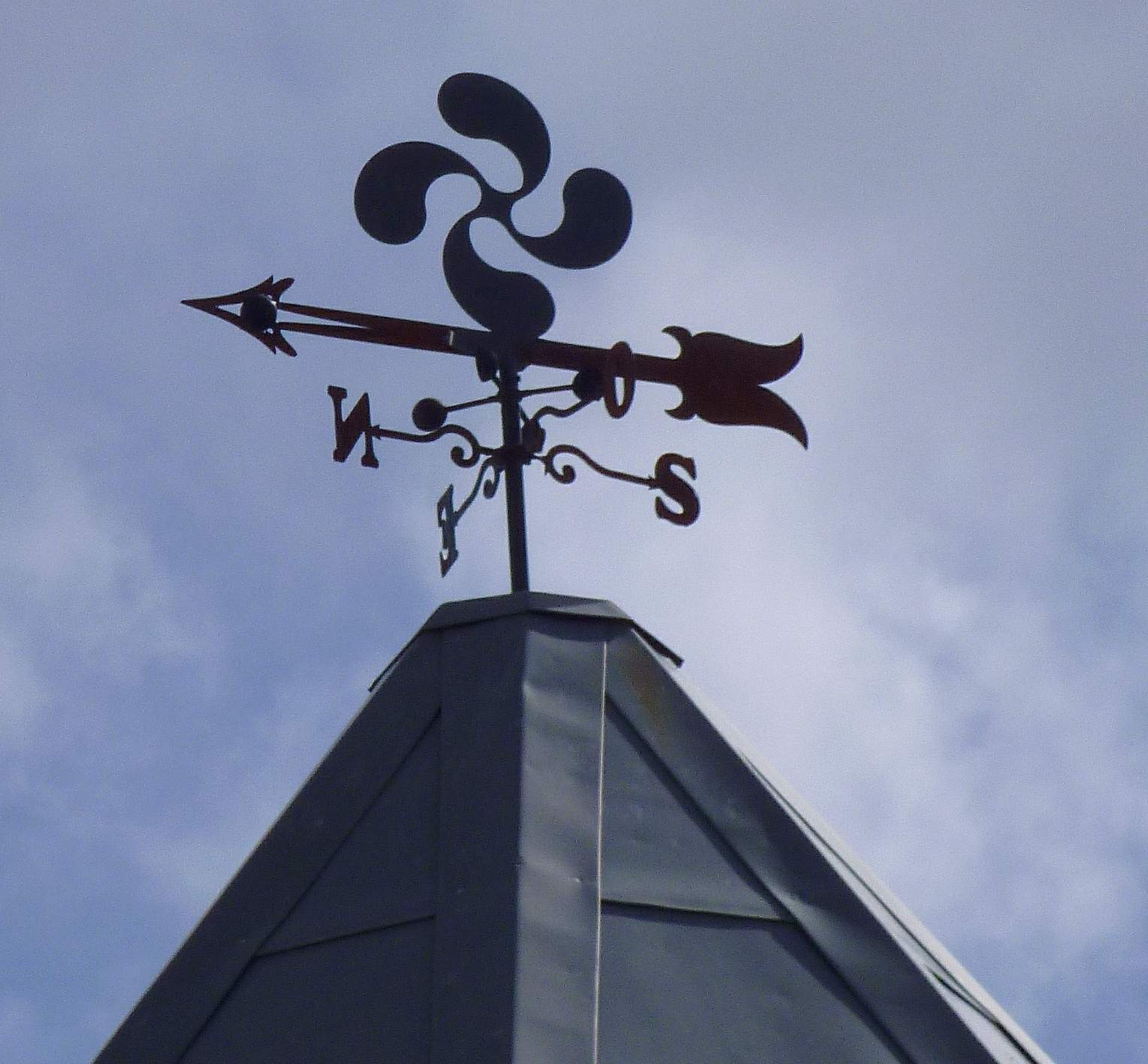 Alegría-Dulantzi (Álava)